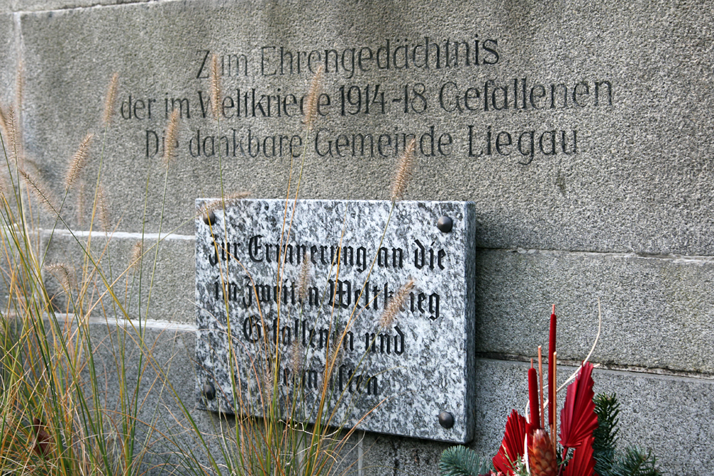 Das Kriegerdenkmal in Liegau-Augustusbad vor der Grundschule, restauriert 2013.